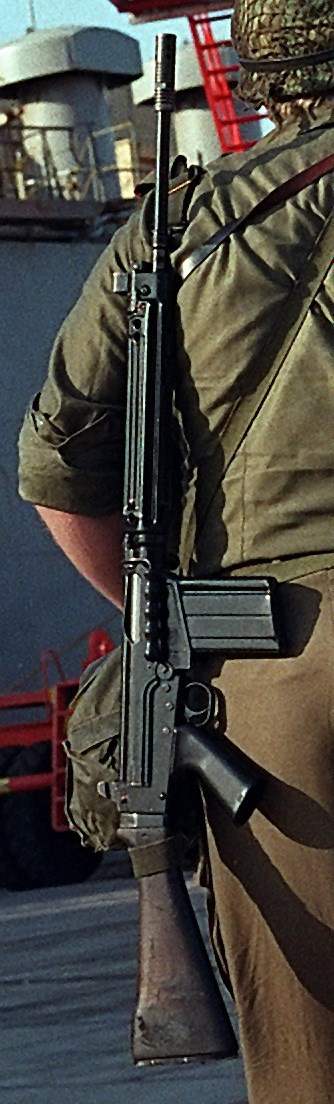 7.62mm Belgian FN FAL rifle (cropped)